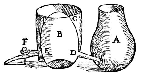 À droite: système de refroidissement du chapiteau. À gauche: cucurbite placée dessous le chapiteau B, Della Porta, Distillations 1609